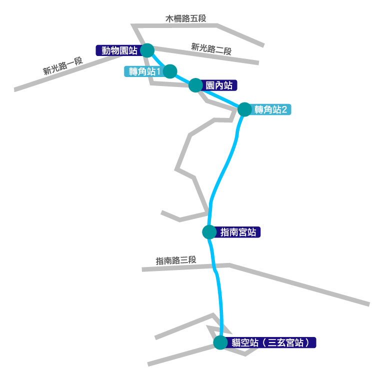 Route map of Maokong aerial tramway in Taipei Taiwan.